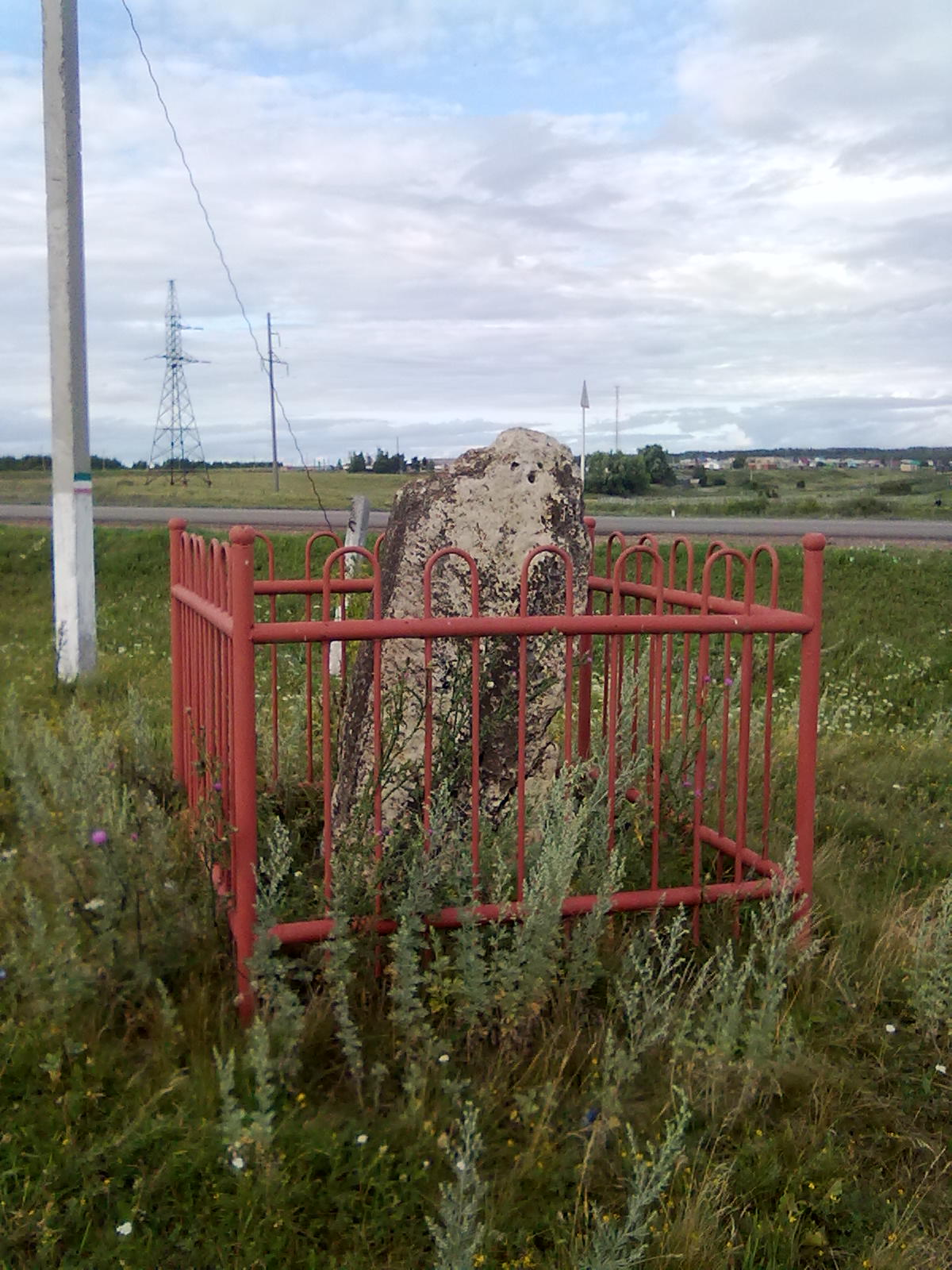 Памятник датированный 1347 годом